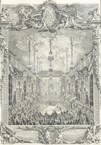 Décoration du bal paré donné par le roi le 24 février 1745, à l'occasion du mariage du dauphin, dans la même salle construite au manège couvert de la grande écurie (sous la conduite de M. de Bonneval)